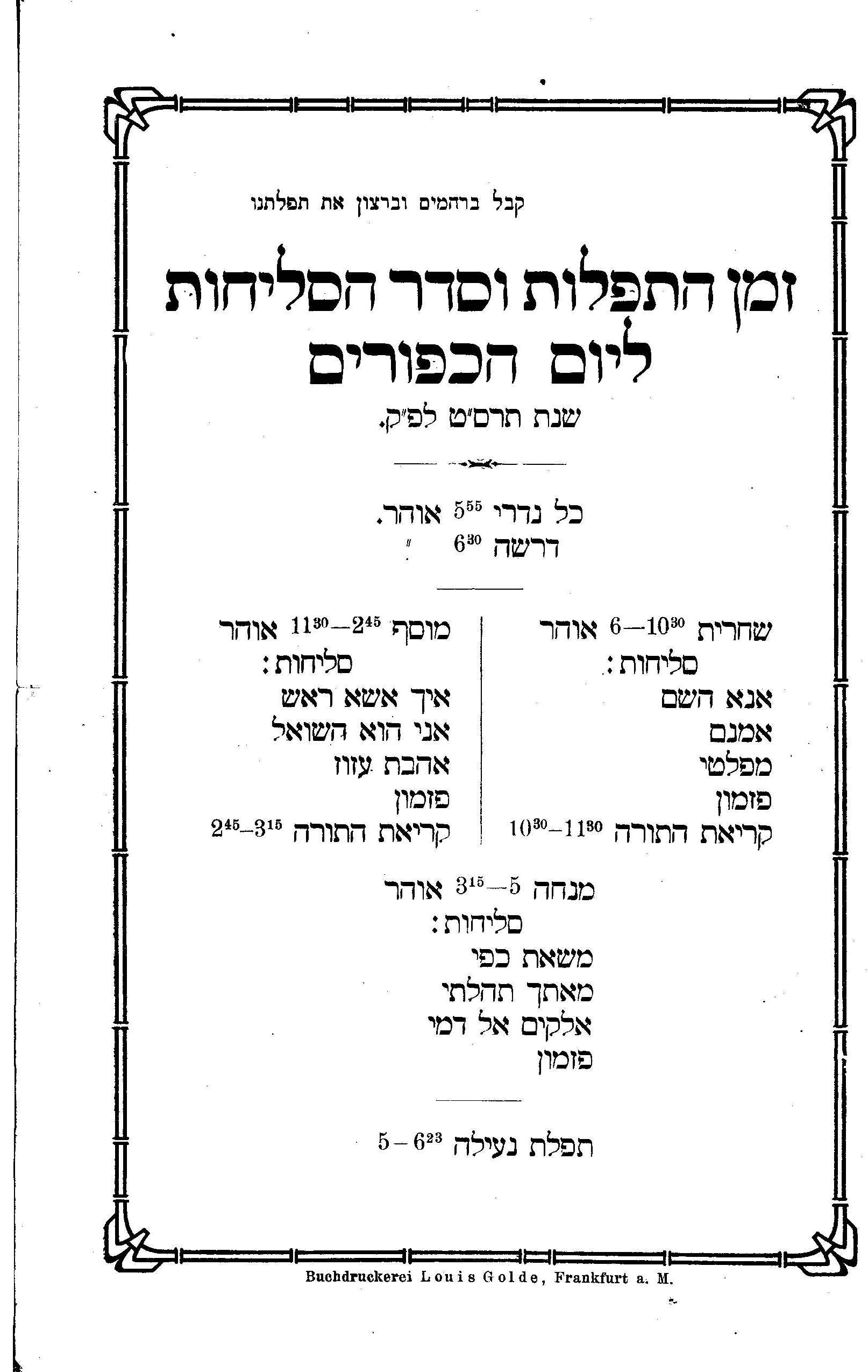 לוח זמנים של תפילות יום כיפור